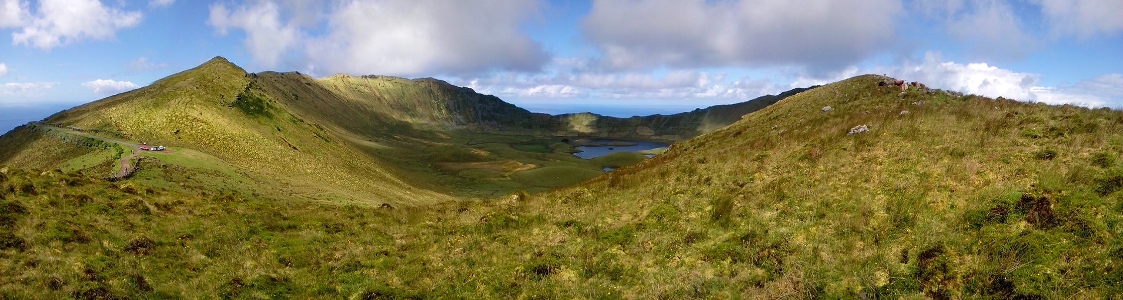 Lagoa do Caldeirão, ilha do Corvo, Açores, Arquivo de Villa Maria, ilha Terceira, Açores